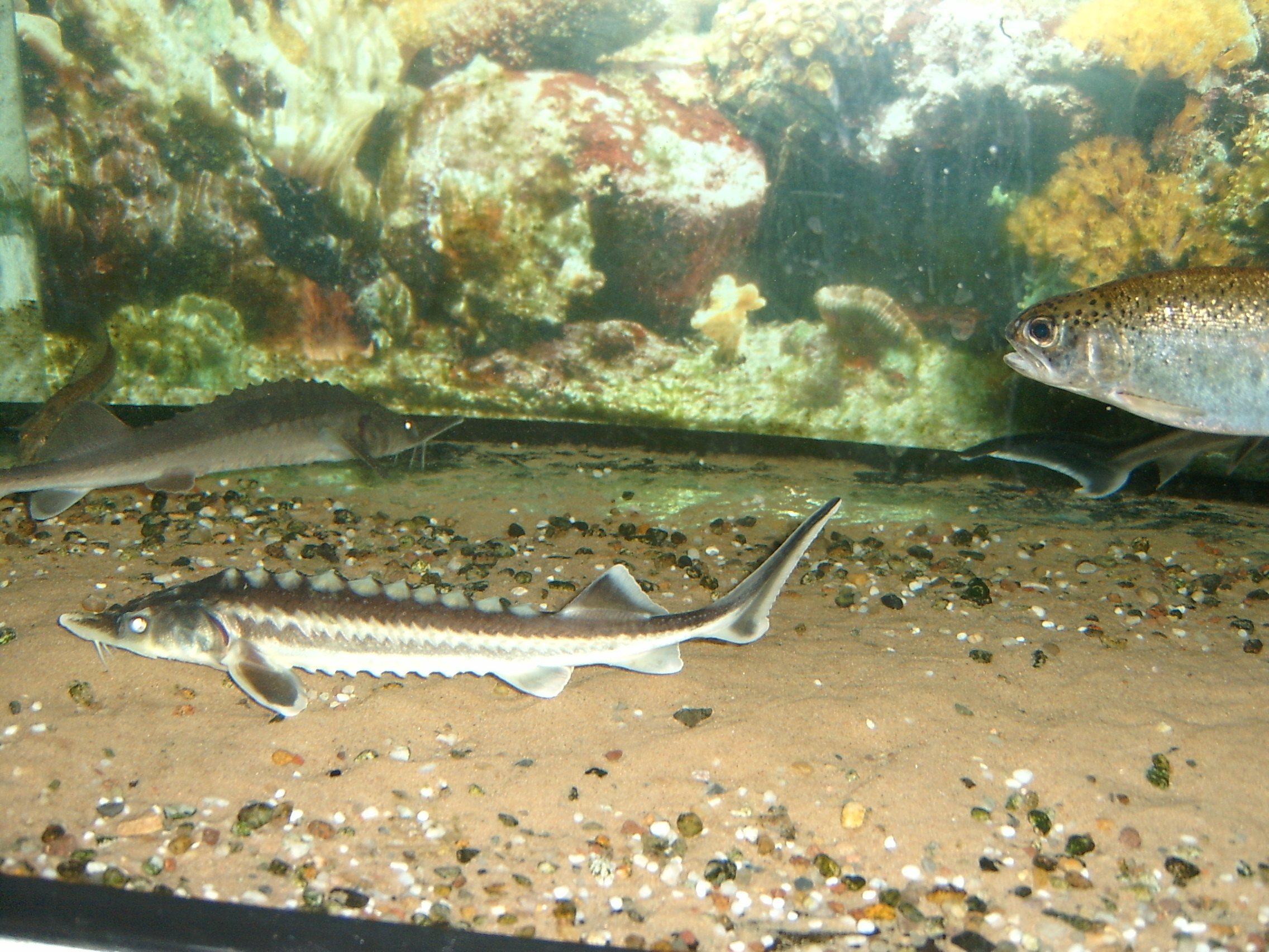 Juvenile specimen of Russian sturgeon (Acipenser gueldenstaedtii Brandt & Ratzeburg, 1833).